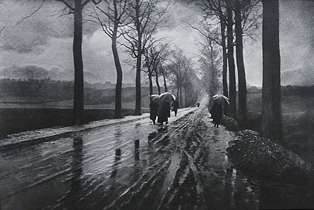 Naar de markt